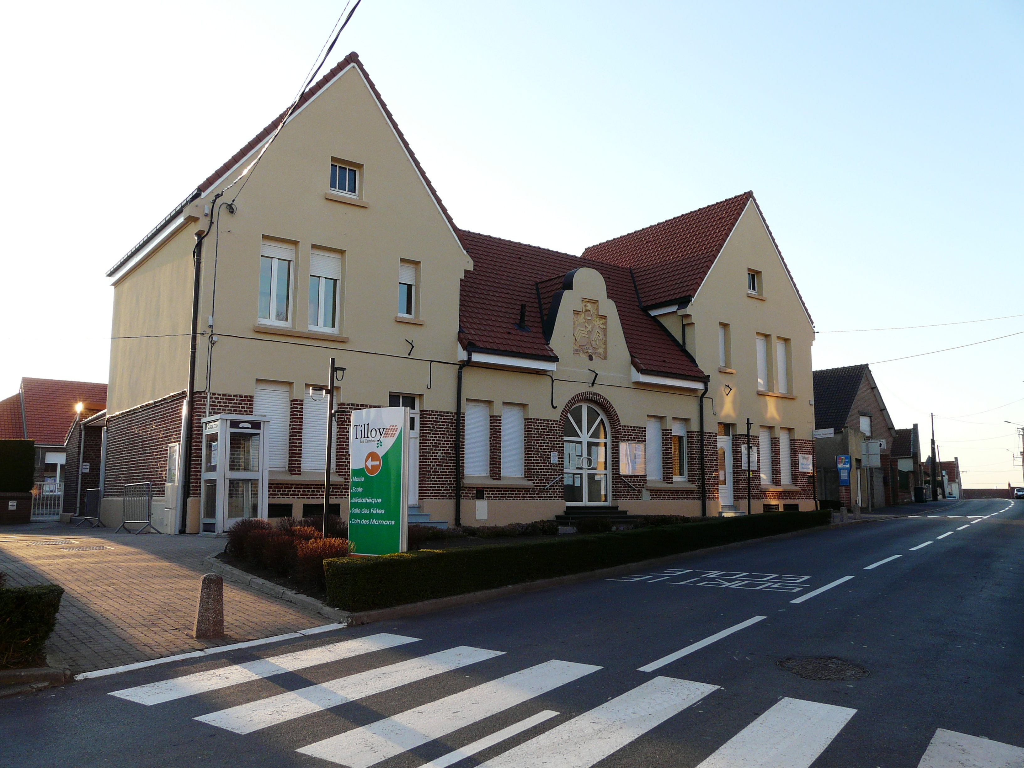 La mairie de Tilloy-lez-Cambrai